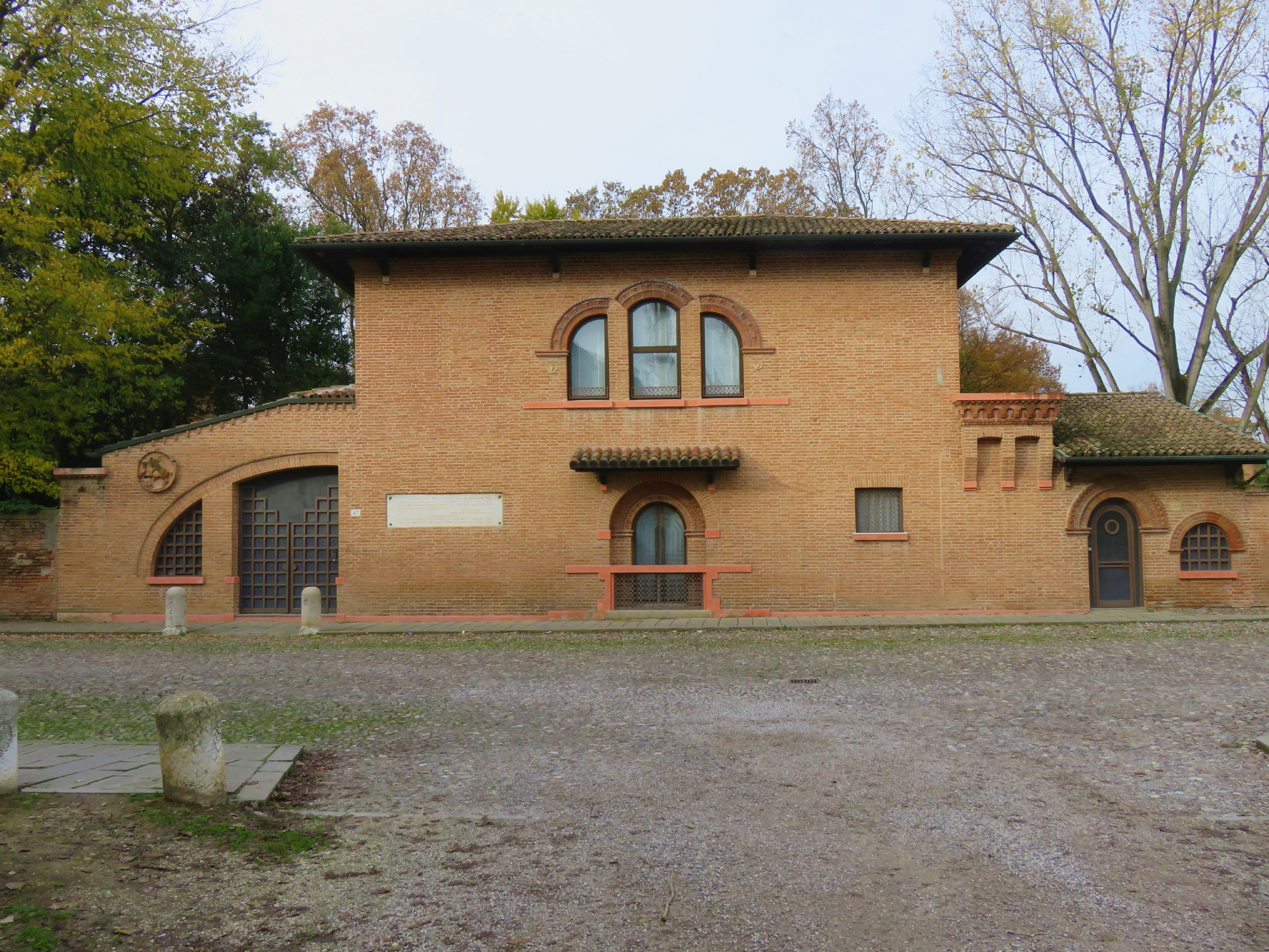 Facciata su corso Ercole I d'Este